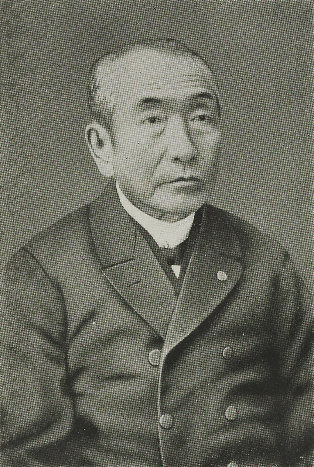 Portrait of Konakamura Kiyonori (小中村清矩, 1822 – 1895)